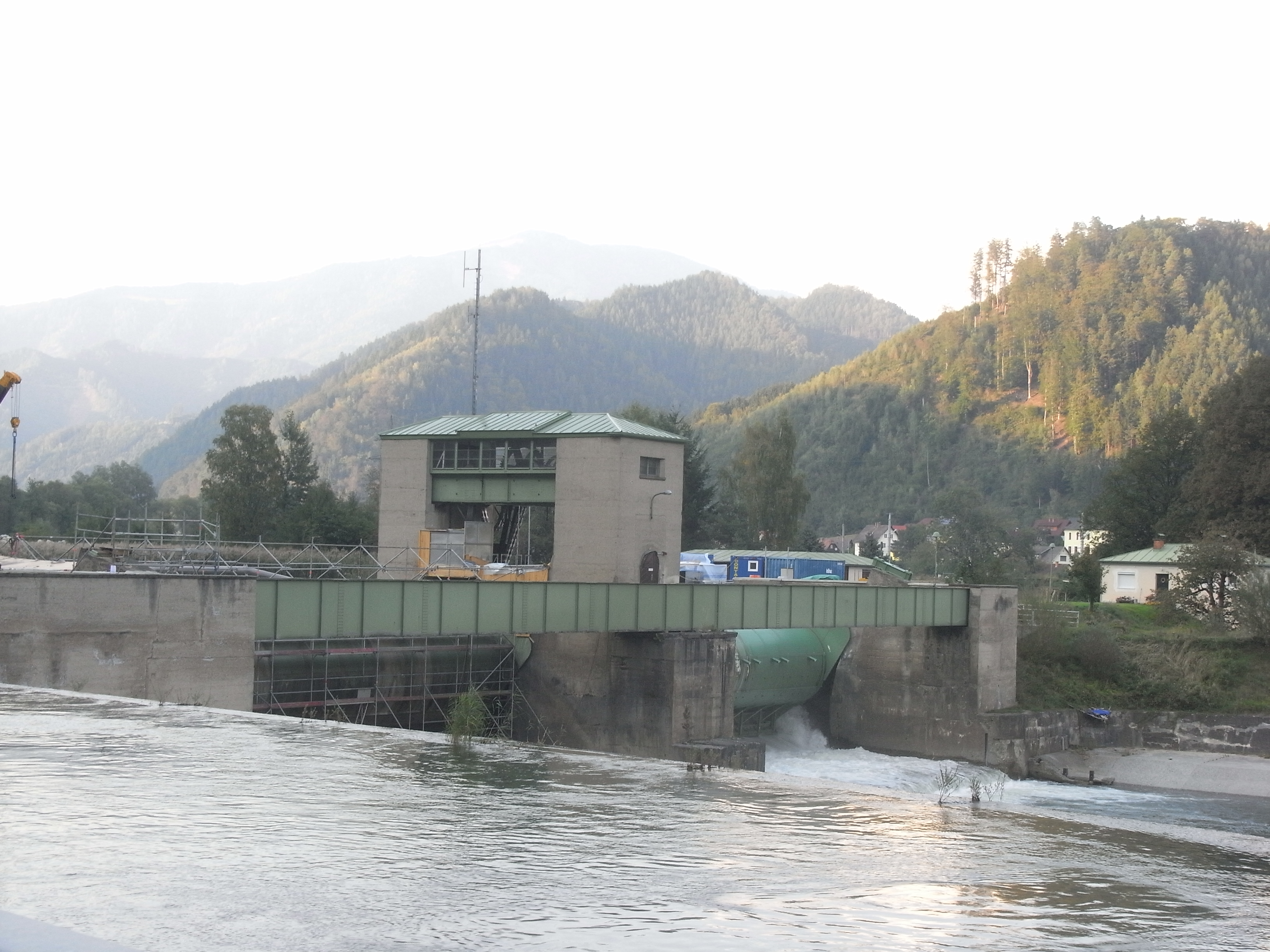 Wehr Mixnitz